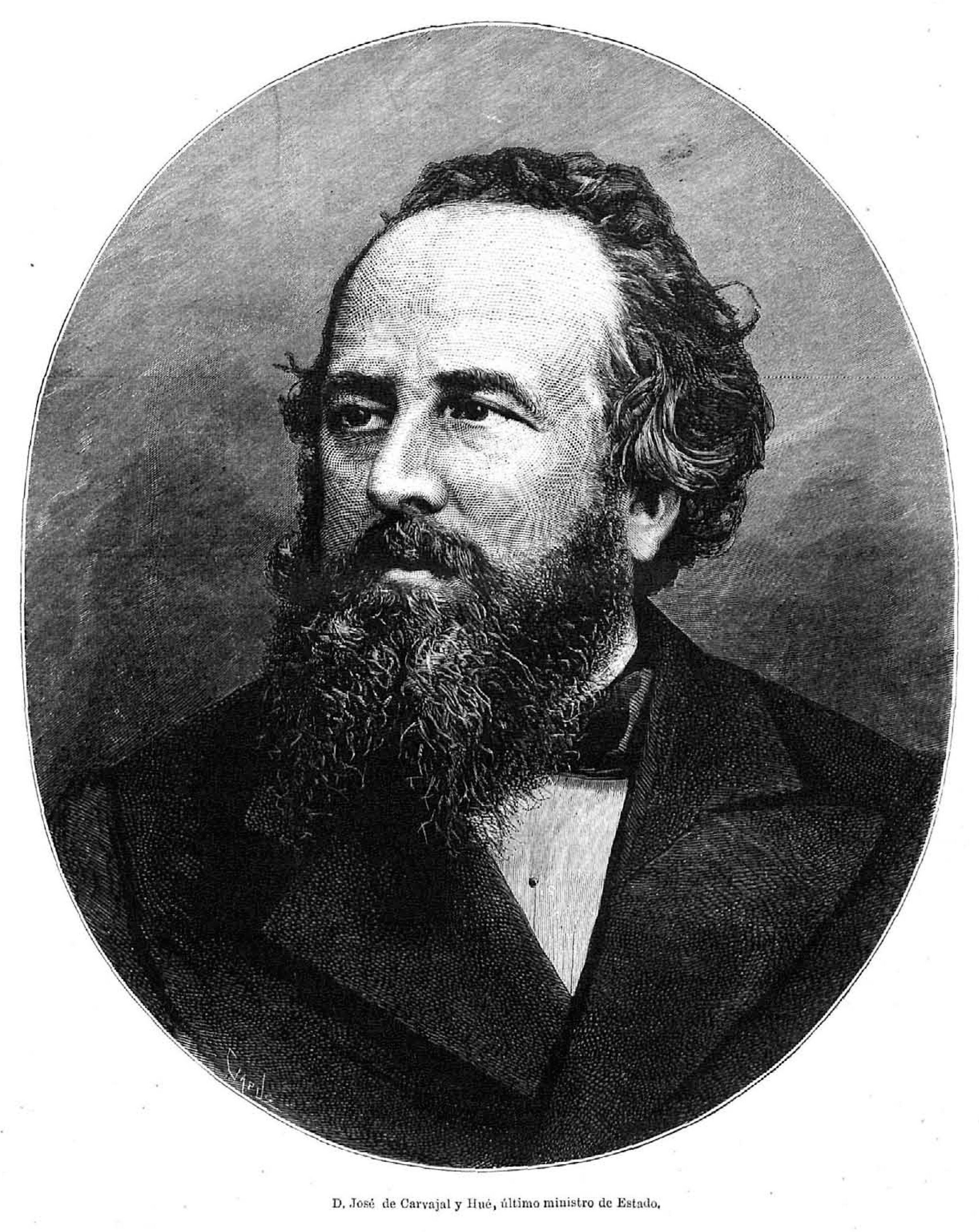 «José Carvajal y Hué, último ministro de Estado», en la revista española La Ilustración Española y Americana.